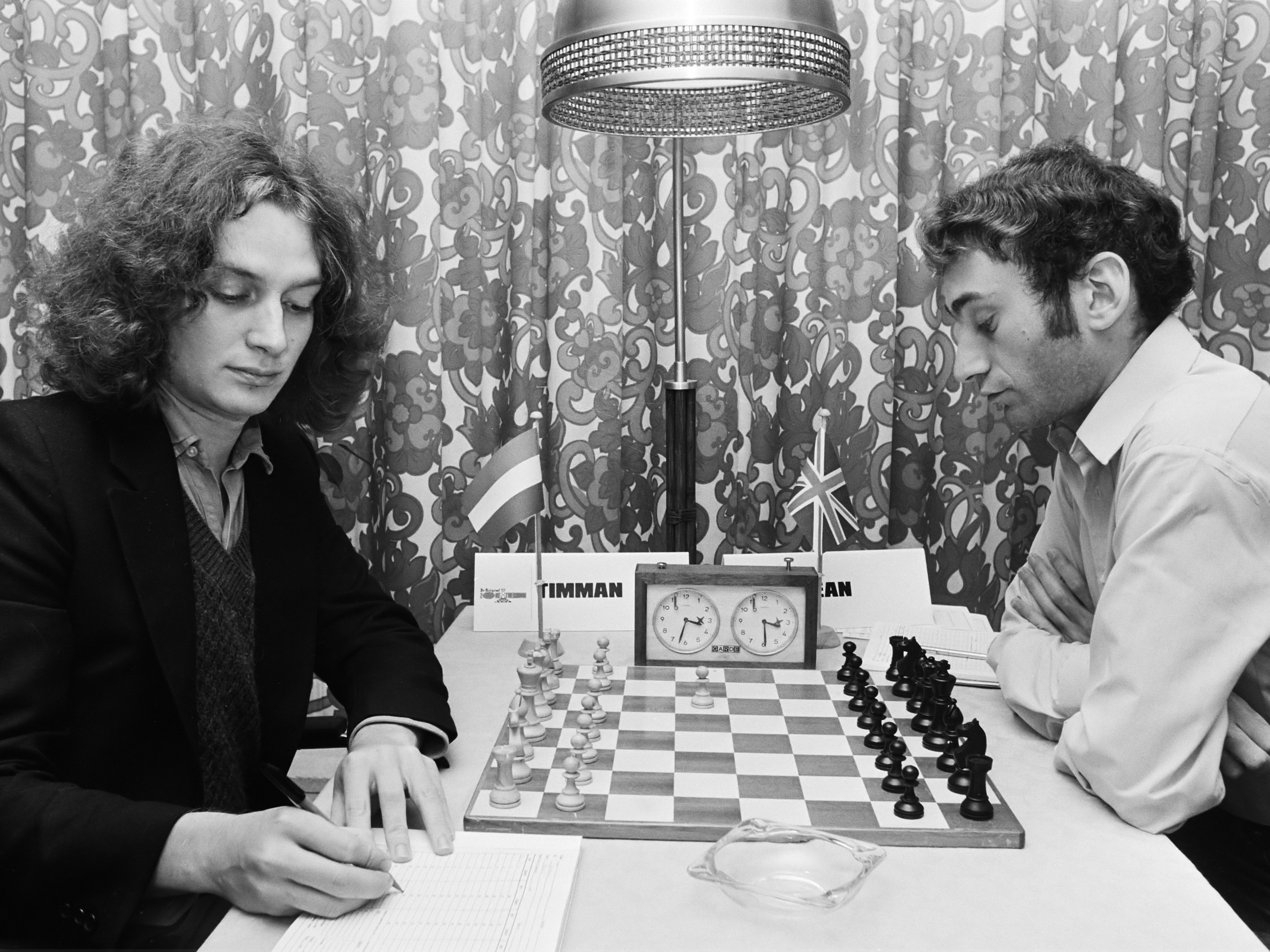 Zoneschaaktoernooi Amsterdam; Timman (l) tegen Stean 27 november 1978